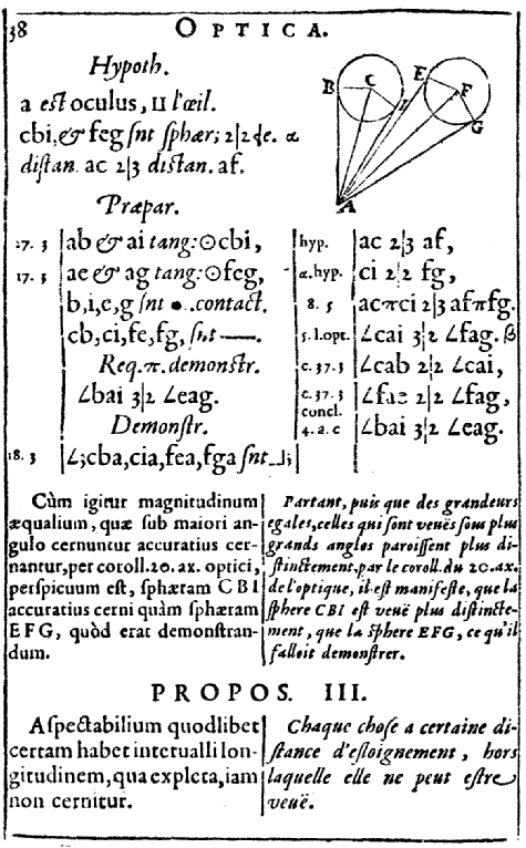 Une démonstration de l'Optique d'Euclide traduite par Hérigone. Cursus mathematicus, nova, brevi et clara methodo demonstratus (Tome V).